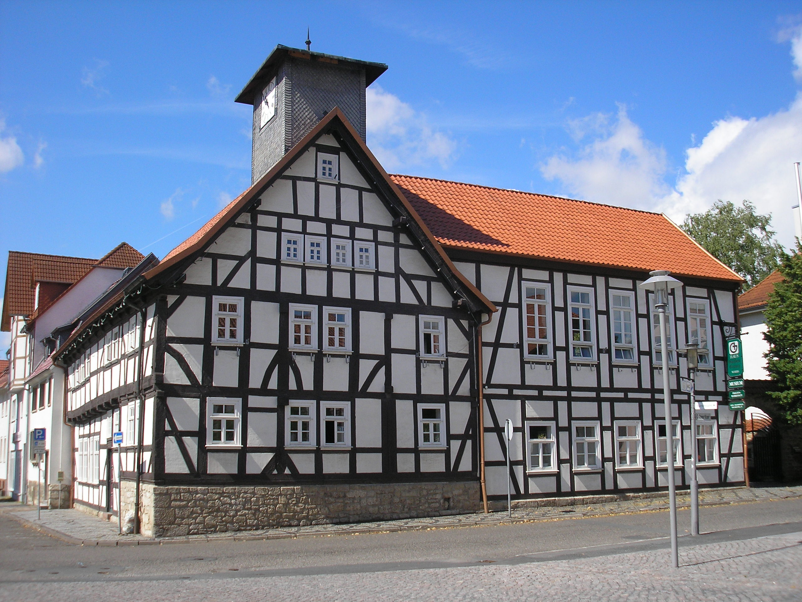 Das ehemalige "Gülden Creutz" Museum in Worbis (Thüringen). Im westlichen Anbau ab 1900 war eine Zigarrenfabrik.